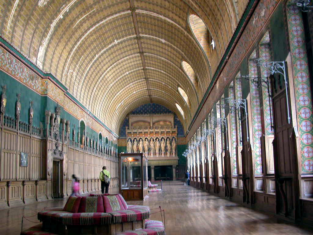 Borne (meuble second empire) octogonale entourée de tabourets de pied, Grande Salle dite aussi Salle des Preux, Château de Pierrefonds, Oise, France